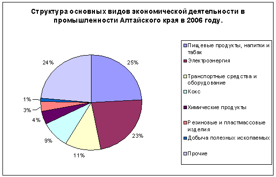 Структура промышленности Алтайского края (2006) график